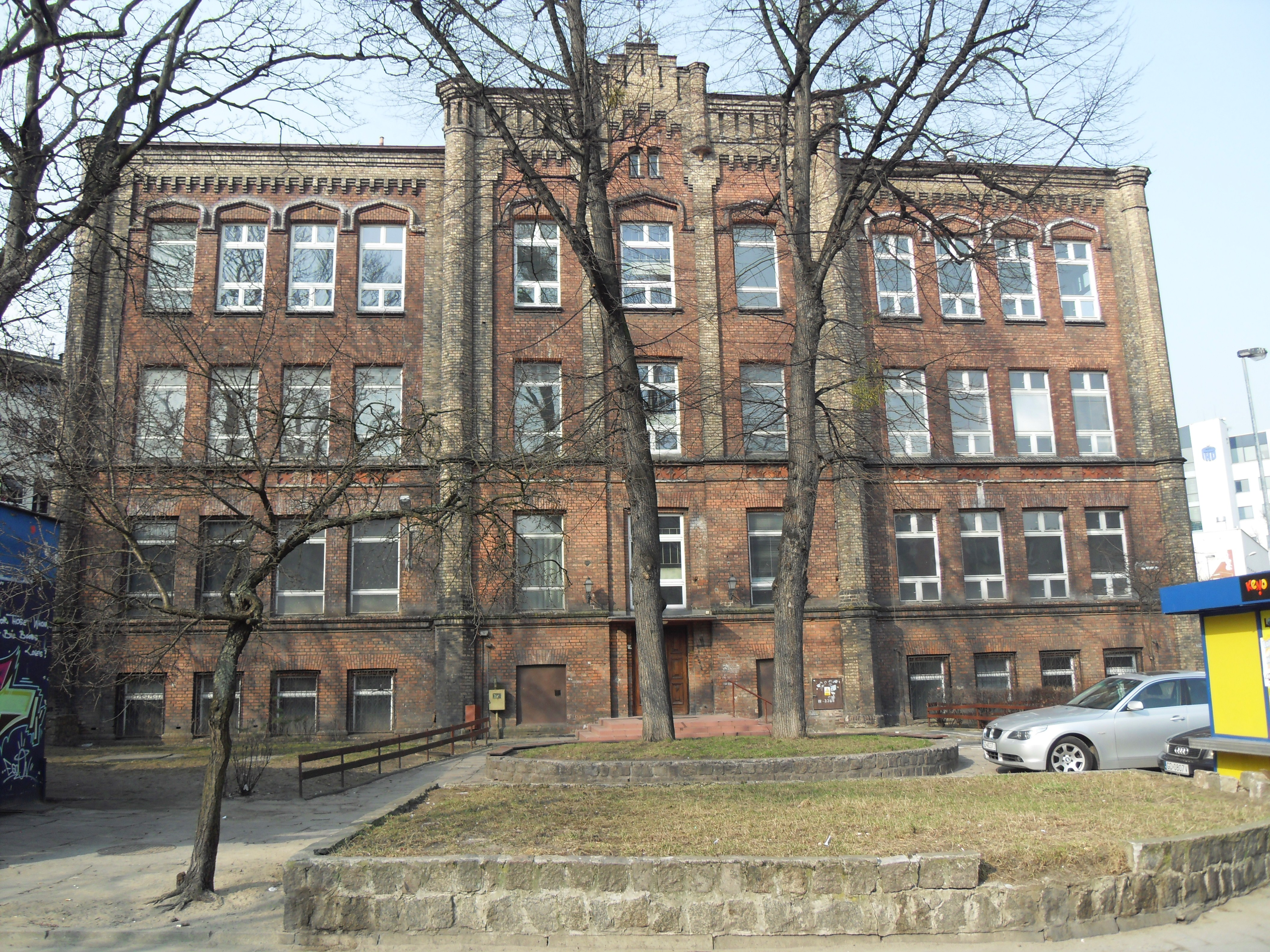 Gdańsk Wrzeszcz, ul. Dmowskiego 16a.